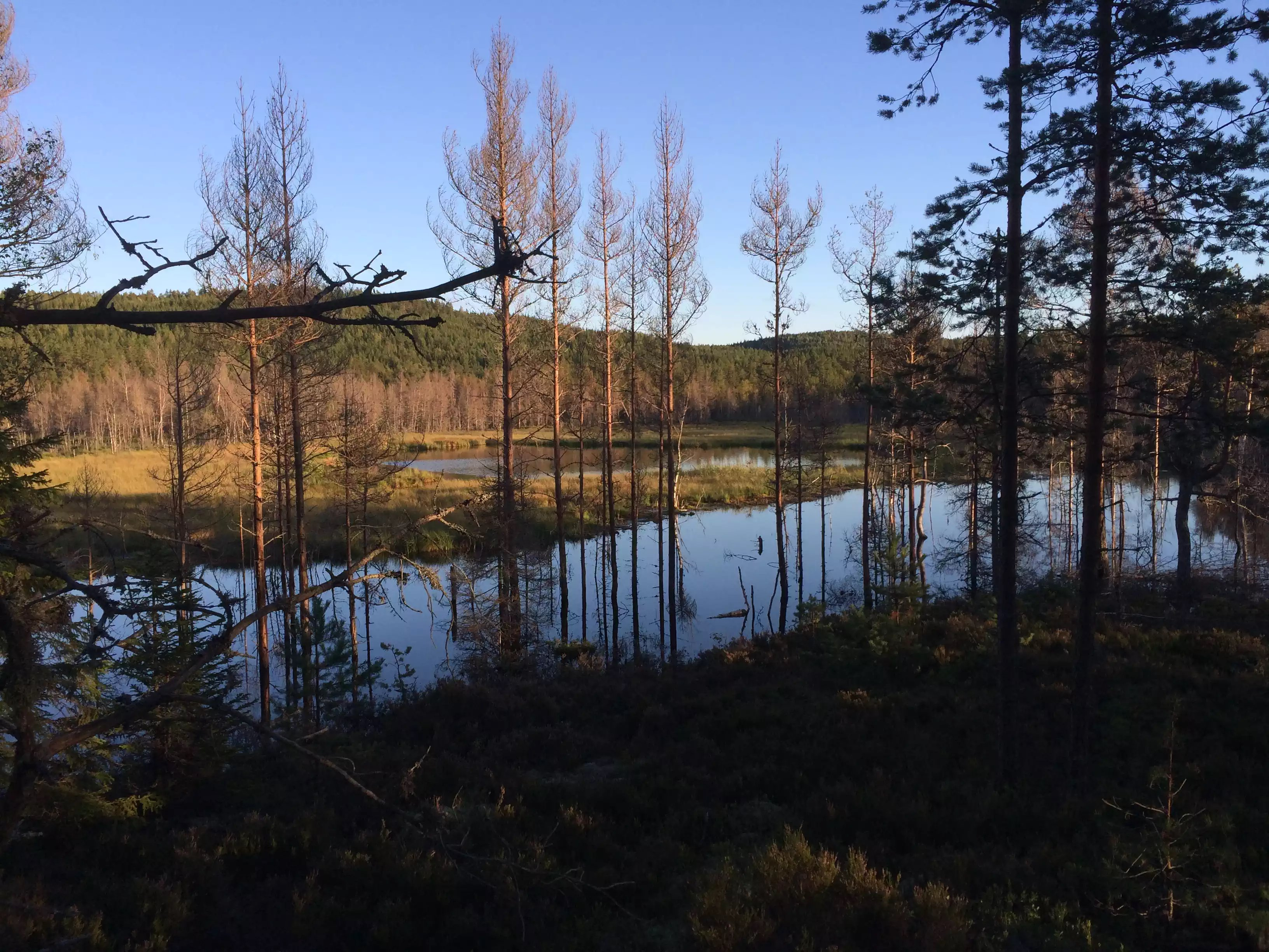 Langmyrtjennet ved Lierfoss i Aurskog-Høland kommune.